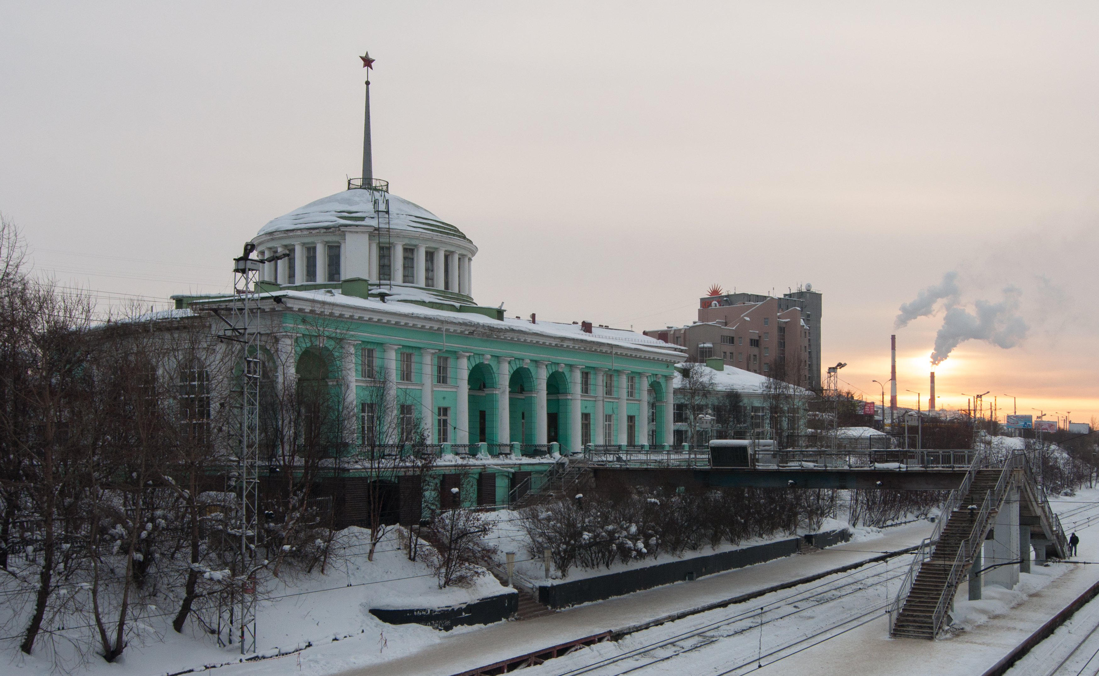 Здание железнодорожного вокзала: улица Коминтерна, 14, Мурманск, Мурманская область